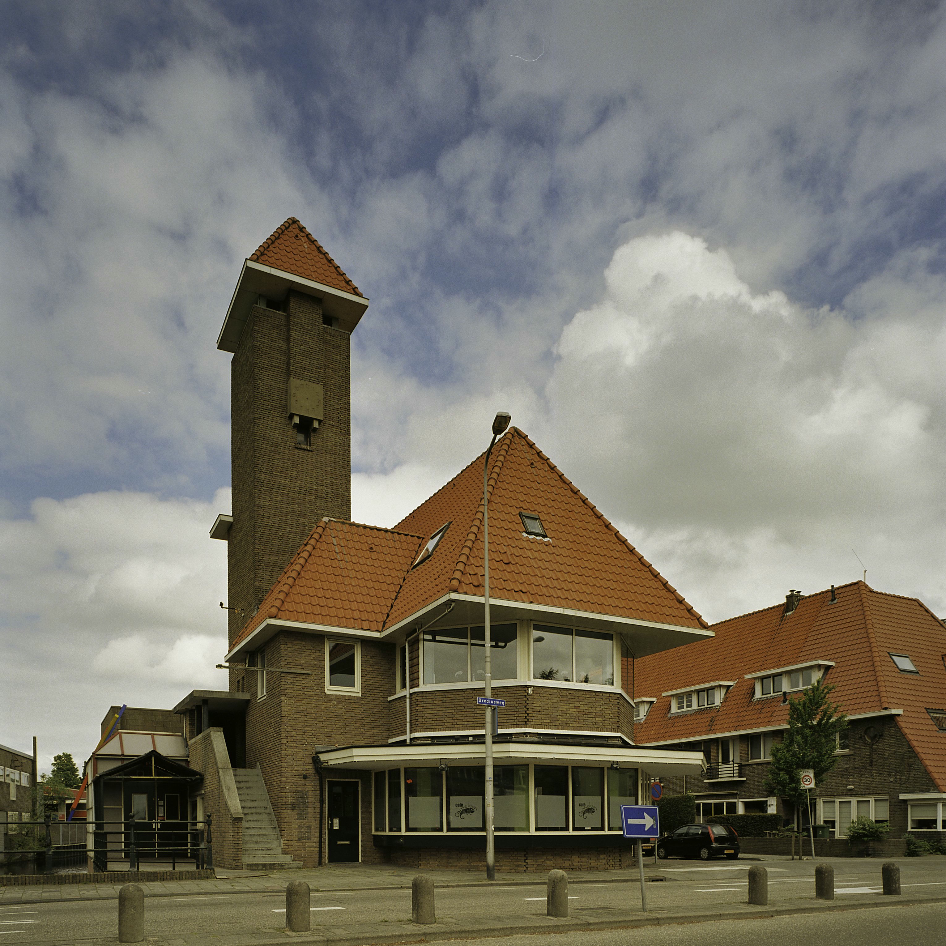 Toren/ Bordes: Overzicht havenkantoor met hoge toren en bordes (opmerking: Gefotografeerd voor Monumenten In Nederland Noord-Holland)